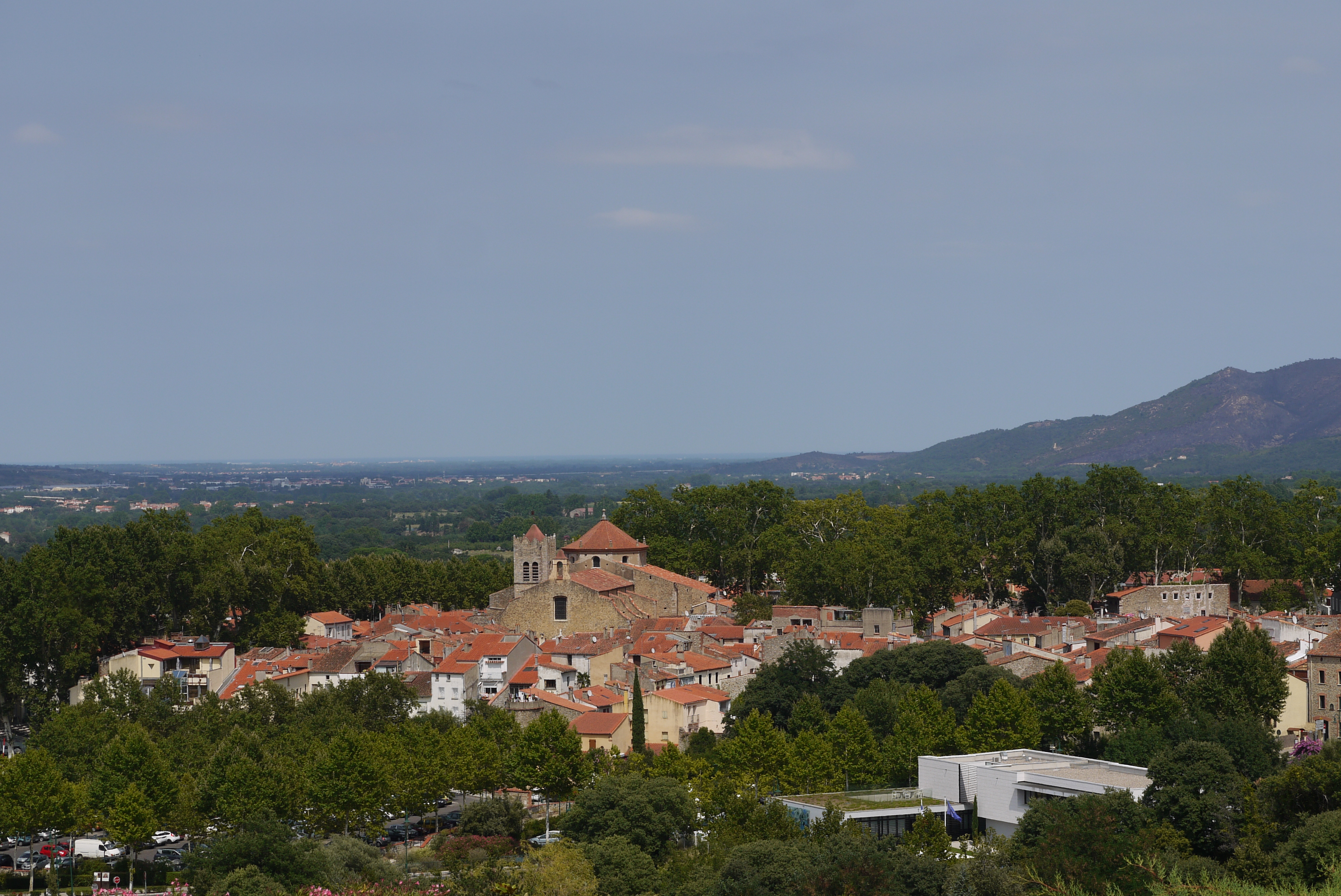 Vue du vieux centre de Céret autour de l'église Saint-Pierre